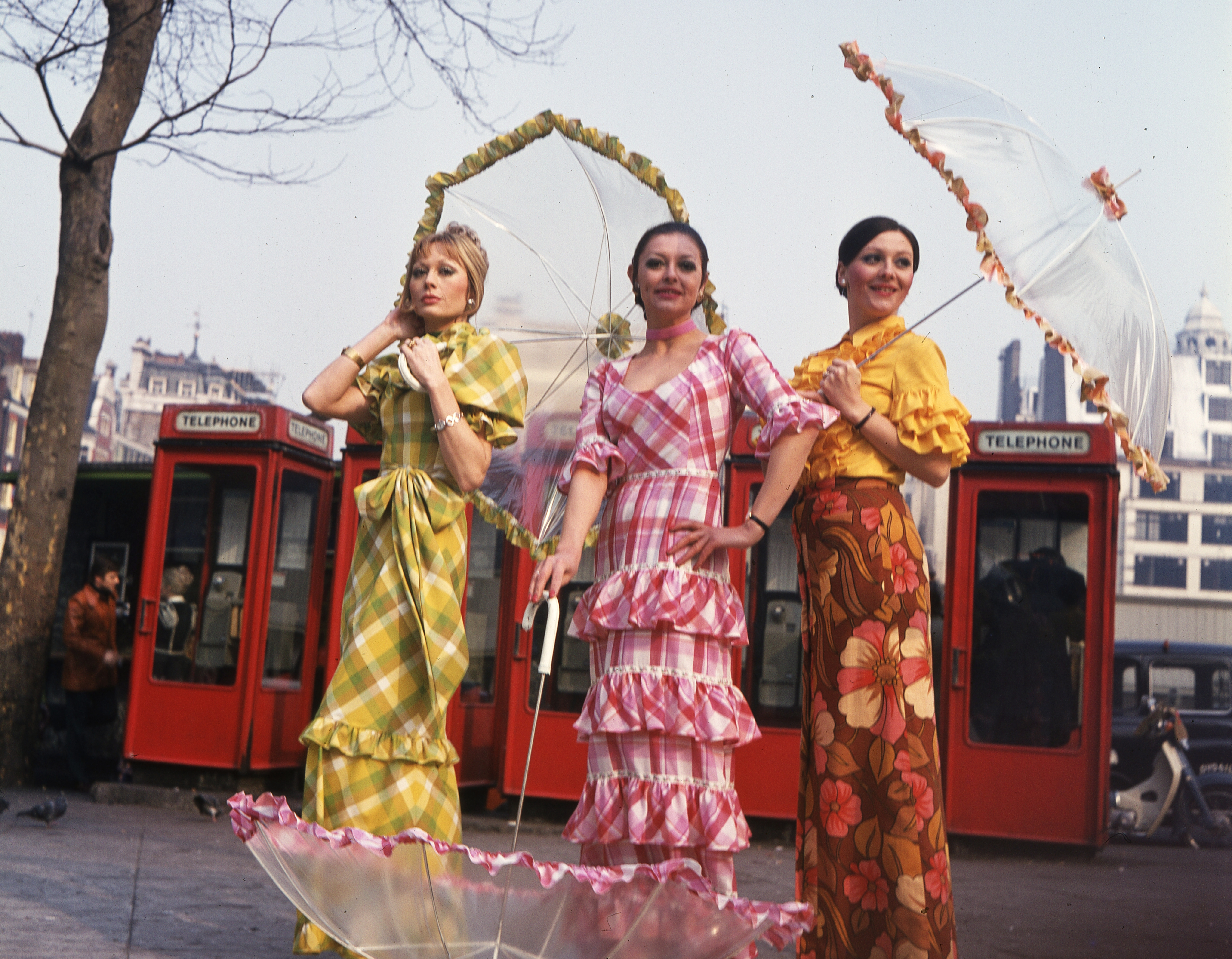 balra Fekete Klári, jobbra Kemenes Mari manökenek. Location: United Kingdom Tags: women, ad, fashion, umbrella, phone booth, colorful, maxi dresses, maxi skirt, blouse Title: balra Fekete Klári, jobbra Kemenes Mari manökenek.